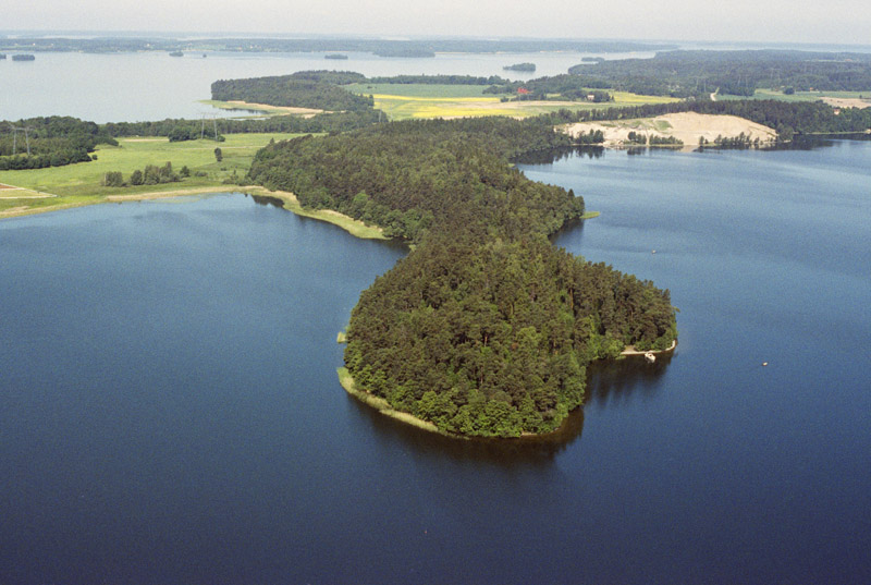 Naturreservatet Huvududden, tidigare Kärsön. Från sydöst. Motiv: Huvududden Nyckelord: Flygbilder, Naturreservat, Riksintressen Kategori: Insjömiljöer Naturreservatet Huvududden, tidigare Kärsön. Från sydöst.